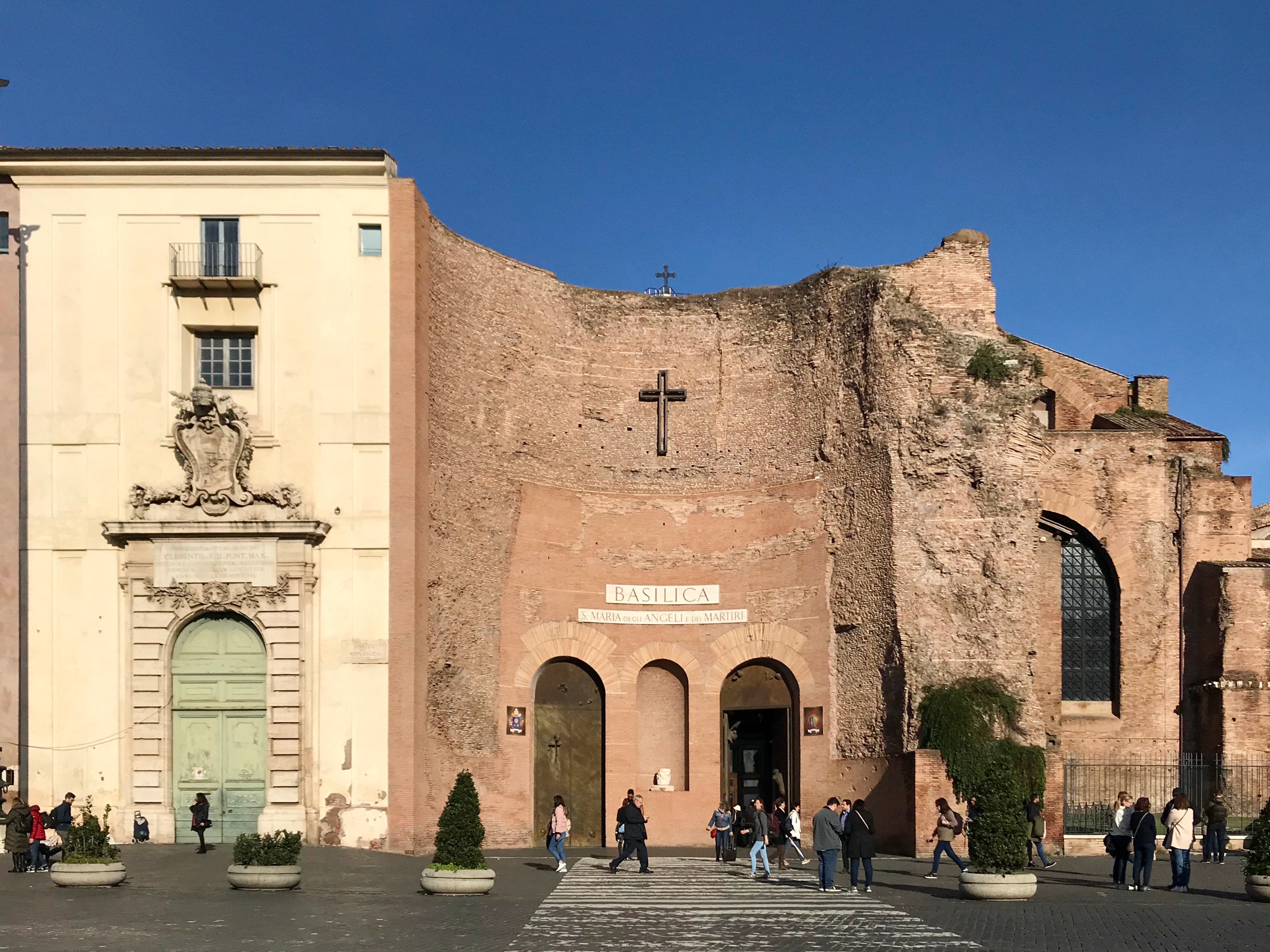 Basilica di Santa Maria degli Angeli e dei Martiri in Rome